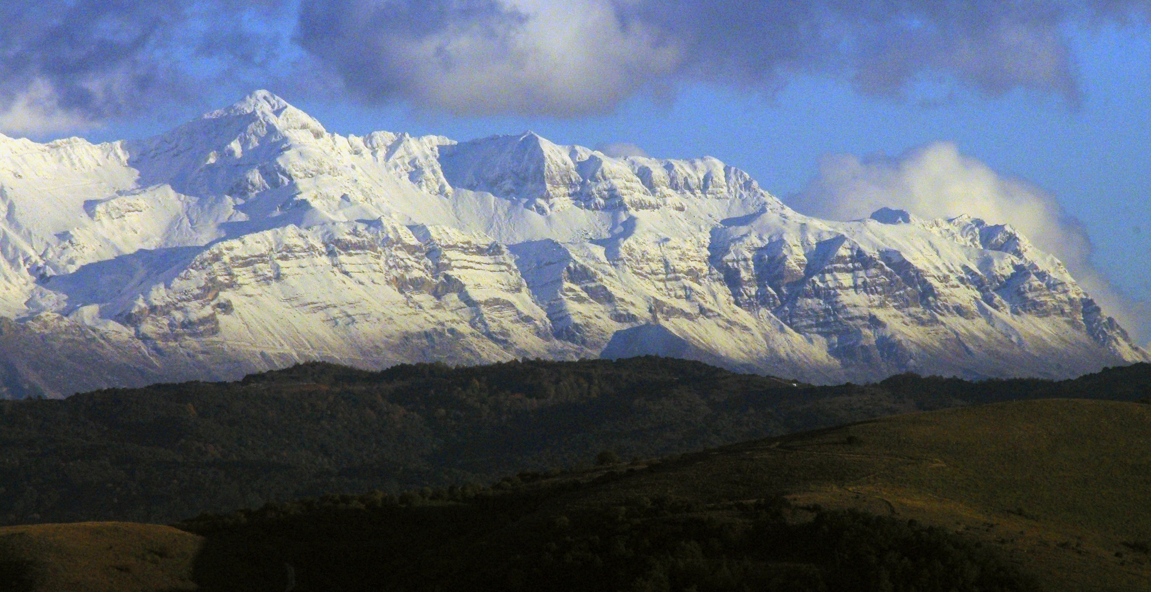 Τα όρη Αθαμανίας ή Τζουμέρκα. This is a photography of Natura 2000 protected area with ID GR2110002